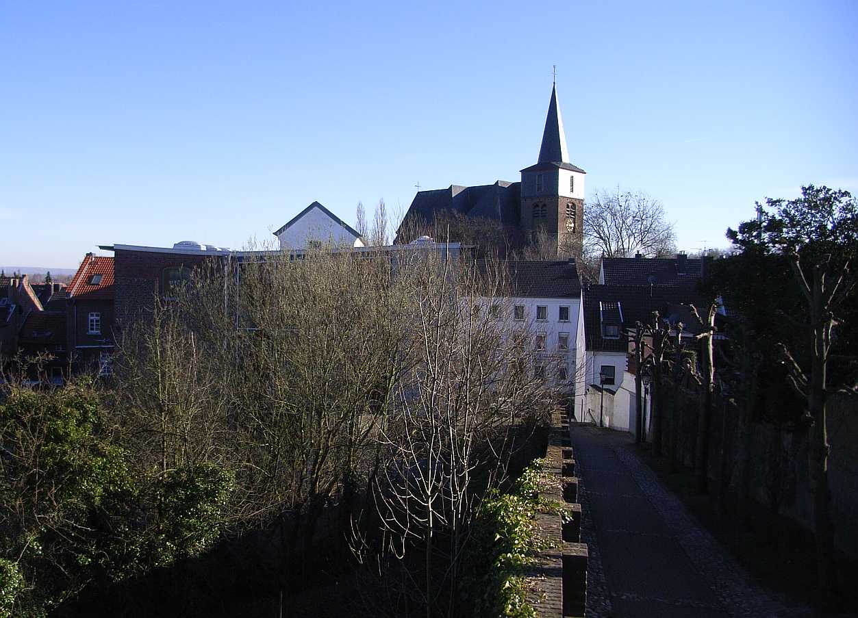 Nordpromenade, Glasmalereimuseum, Kirche Linnich